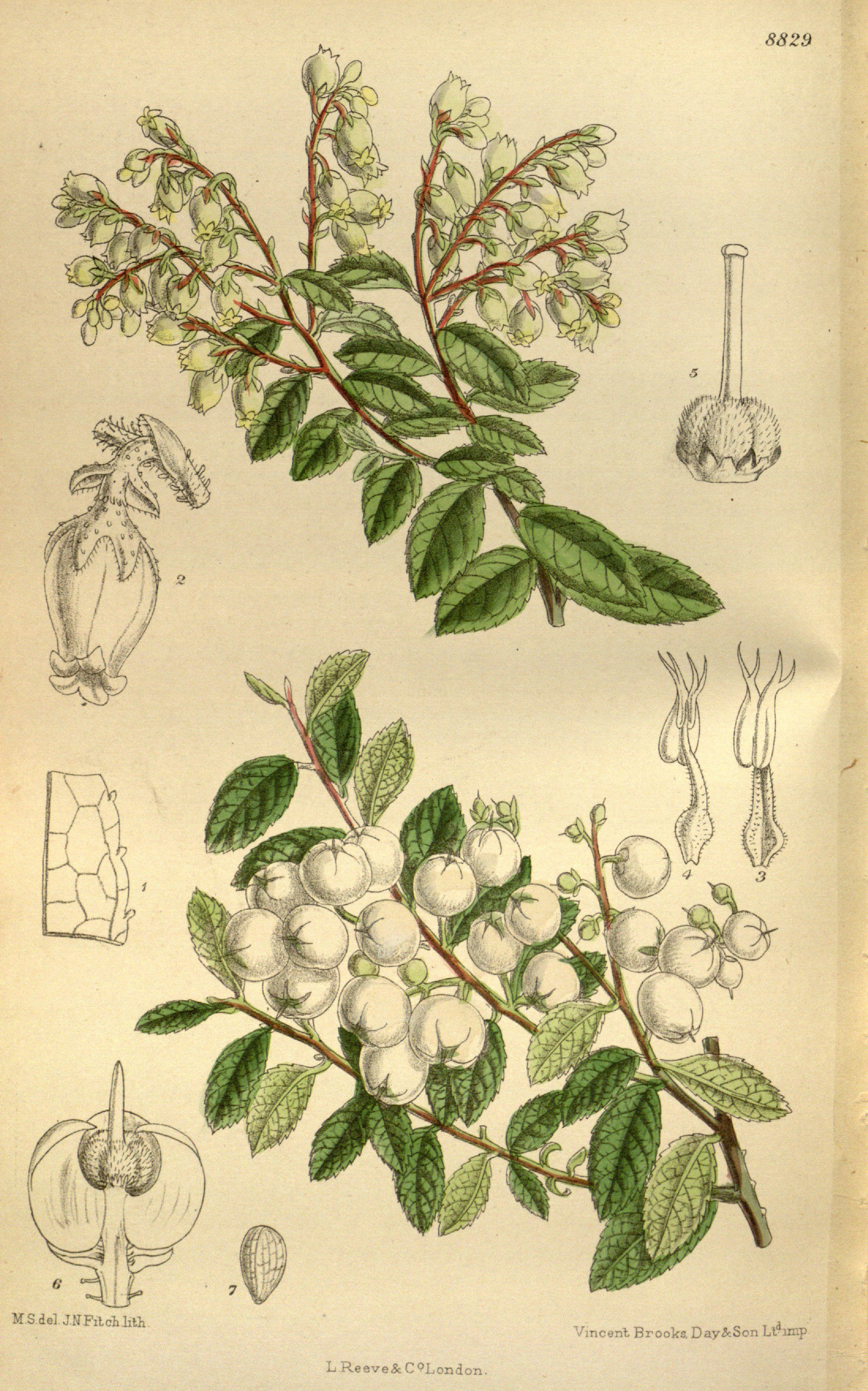 Gaultheria cuneata, Ericaceae